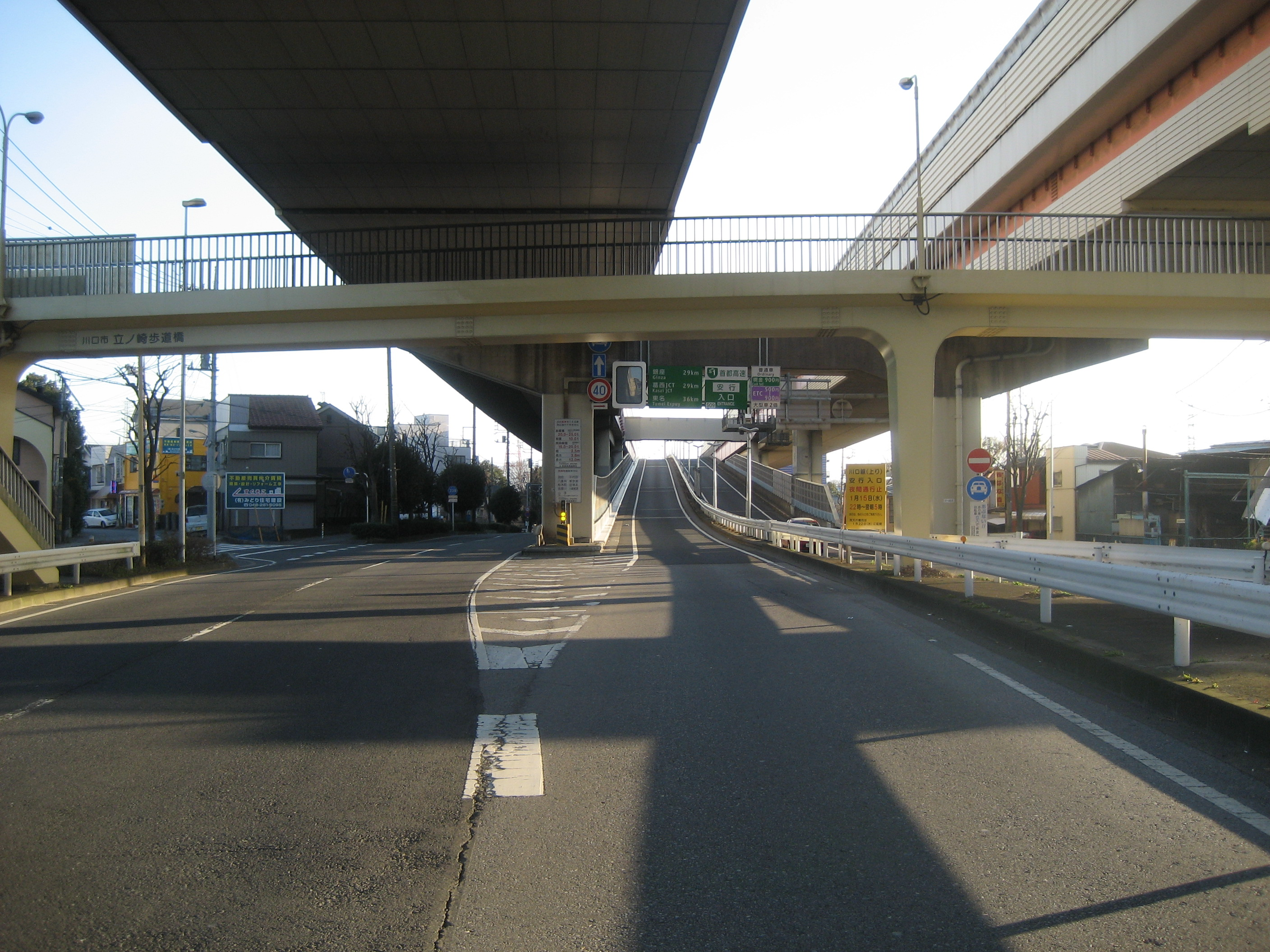 首都高速川口線安行入口（一般道から撮影）